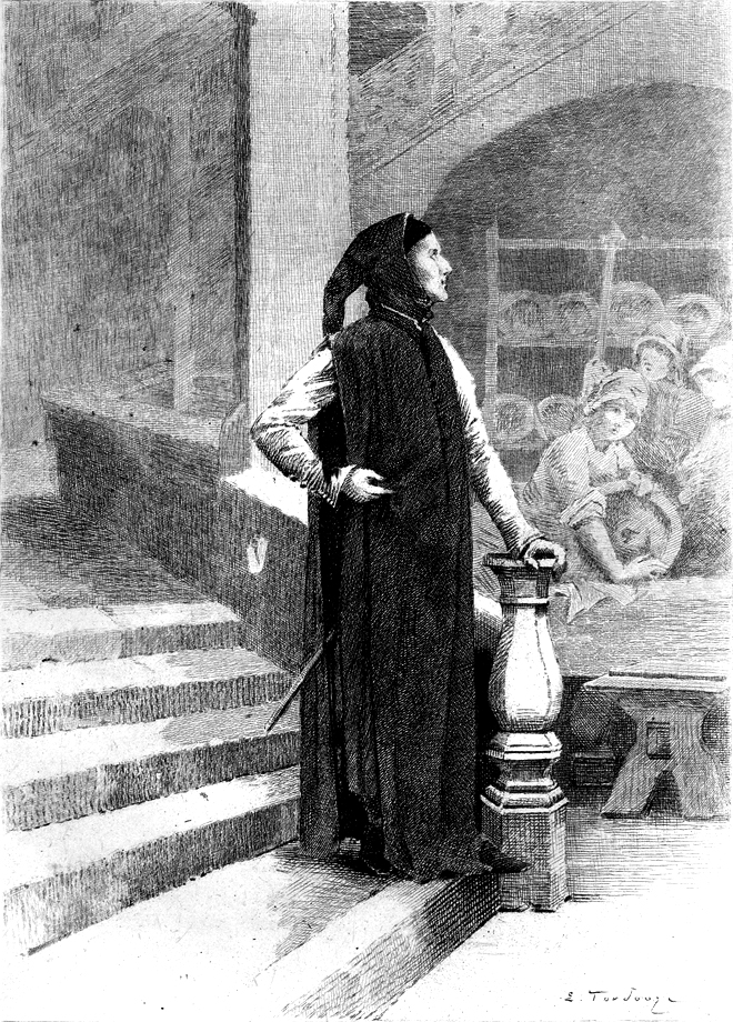 Title page of Honoré de Balzac's The Exiles (1831).